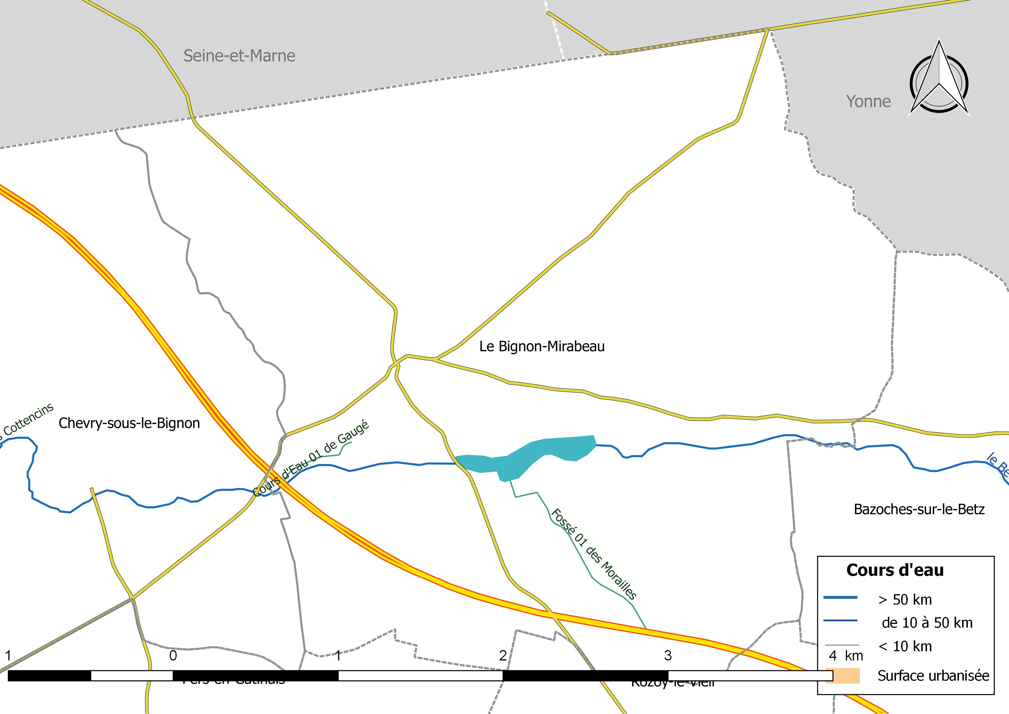 Carte du réseau hydrographique de la commune de Le Bignon-Mirabeau (France).